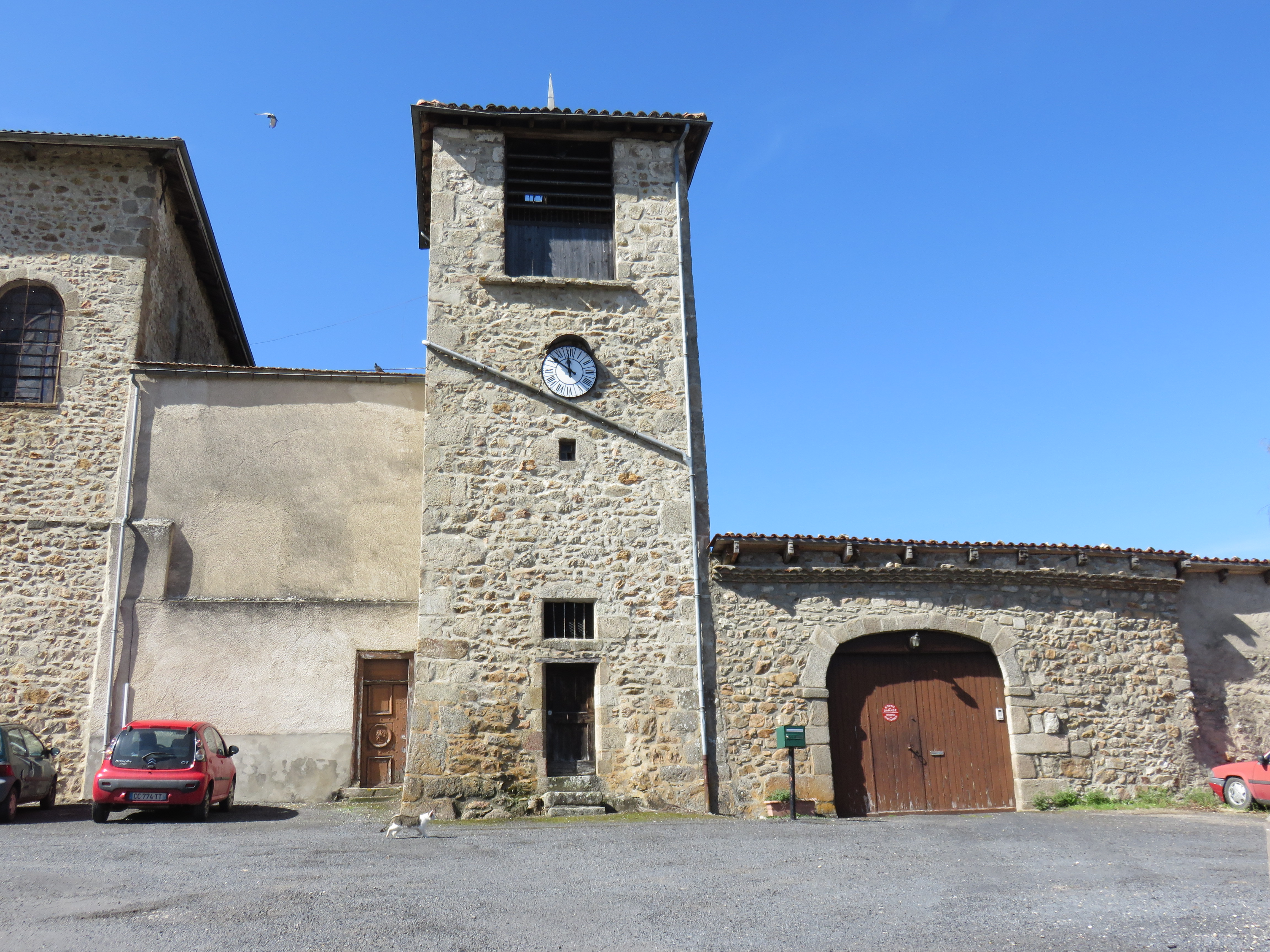 Ancien prieuré de Chaumont-le-Bourg (Puy-de-Dôme, France).